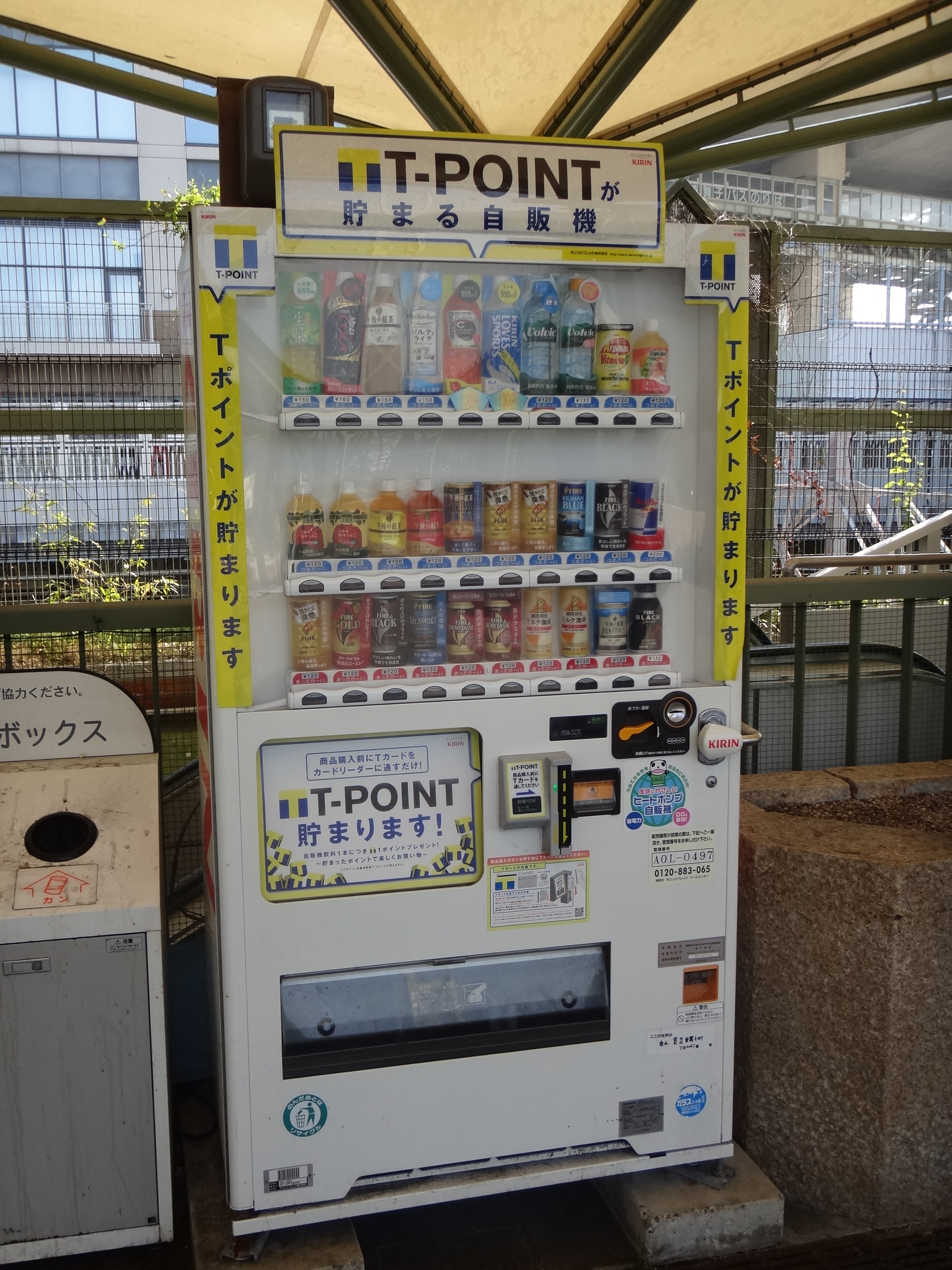 Tポイントをためることができる自動販売機（神戸市垂水区・舞子駅）